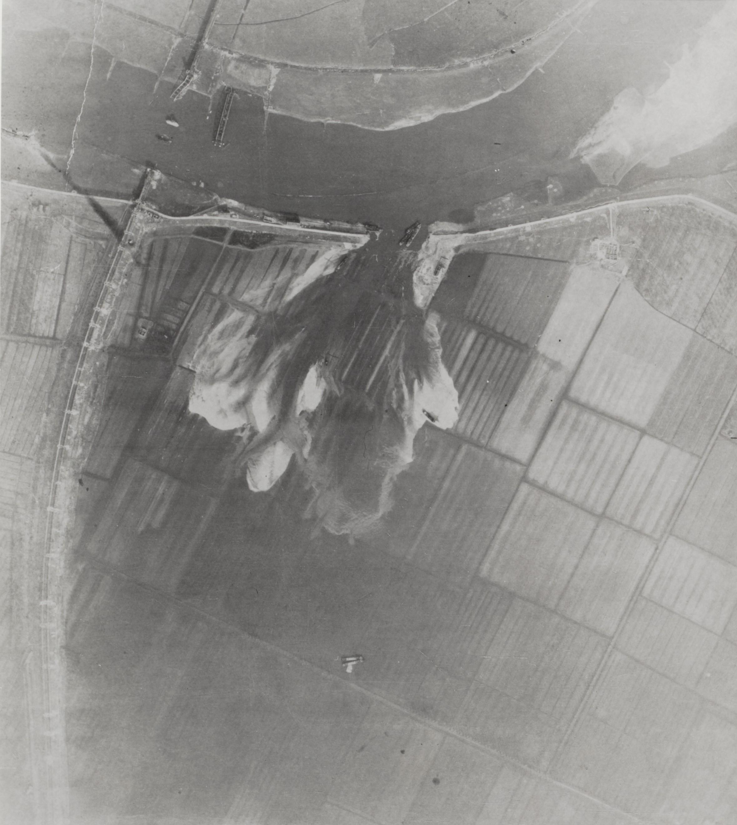 Luchtopname. De dijkdoorbraak bij Elden onder Arnhem. Om het Rijnfront makkelijker te kunnen verdedigen, besluiten de Duitsers de Betuwe onder water te zetten. Ze breken de Rijndijk door op een punt dat ongeveer 500 meter ten oosten van de toen reeds vernielde spoorbrug bij Oosterbeek ligt. In de nacht van 3 december 1944 stroomt het water met geweld door het grote gat in de dijk.